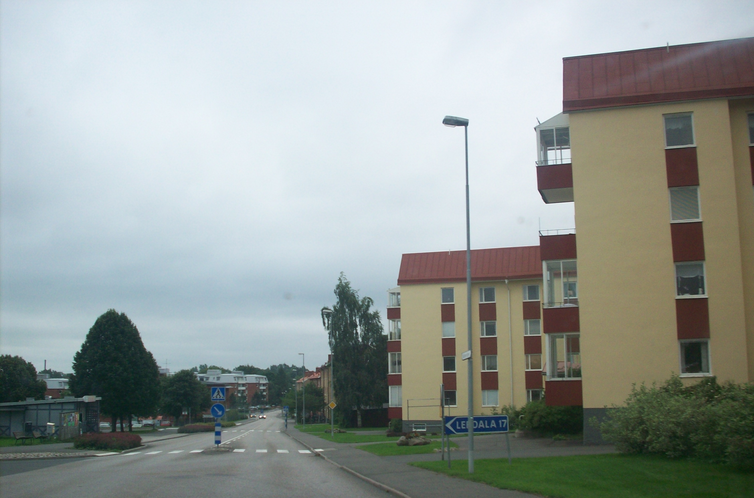 Billingsluttningen